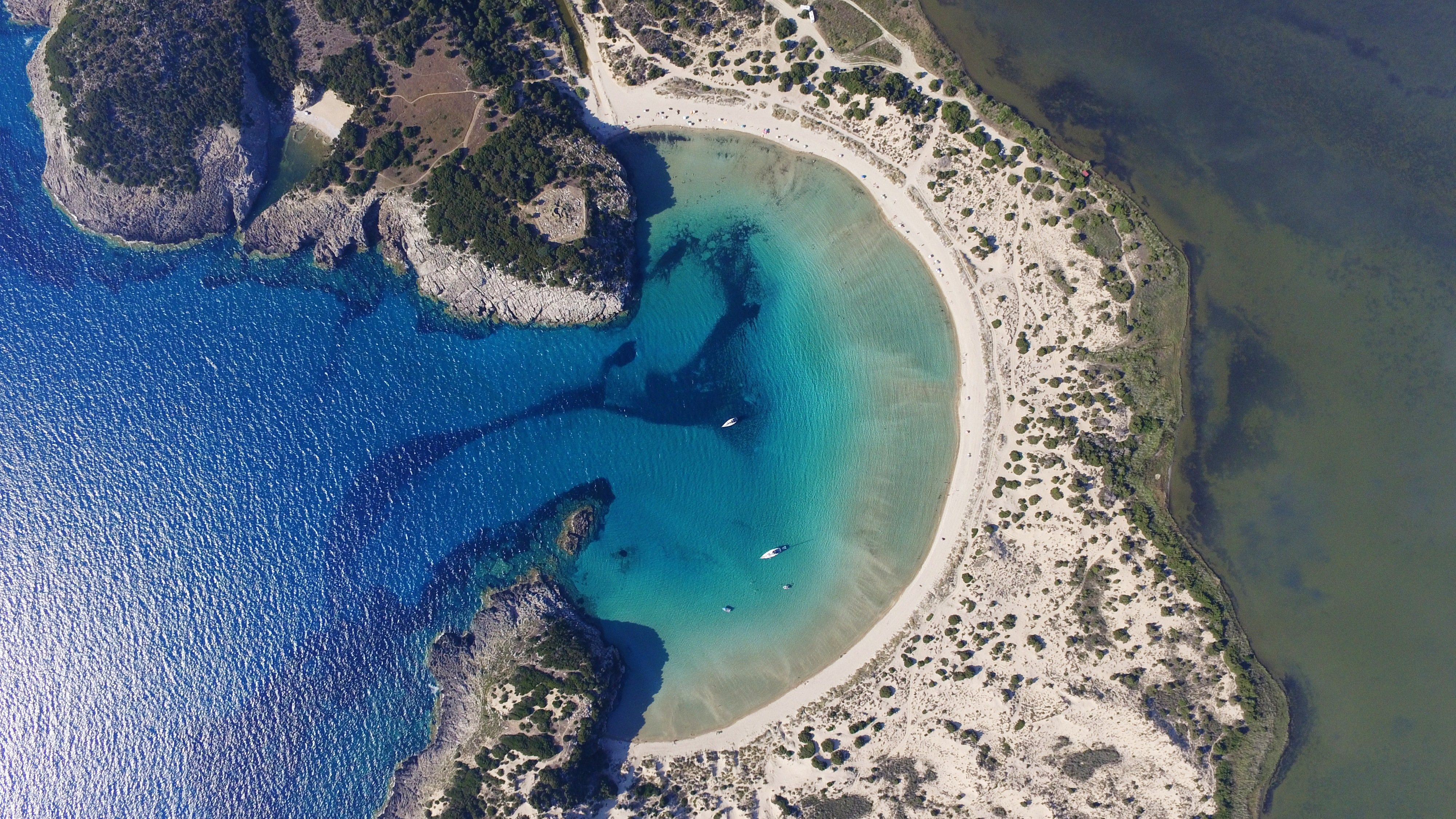 Εναέρια φώτο τραβηγμένη με drone. Διακρίνονται η Παραλία Βοιδοκοιλιά στα αριστερά και η λιμνοθάλασσα της Γιάλοβας στα δεξιά This is a photography of Natura 2000 protected area with ID GR2550008